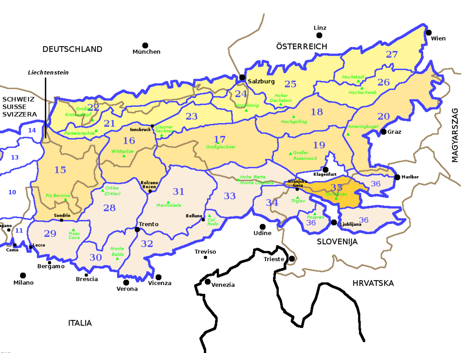 Alpi Orientali secondo la SOIUSA con evidenziate le Alpi di Carinzia e di Slovenia